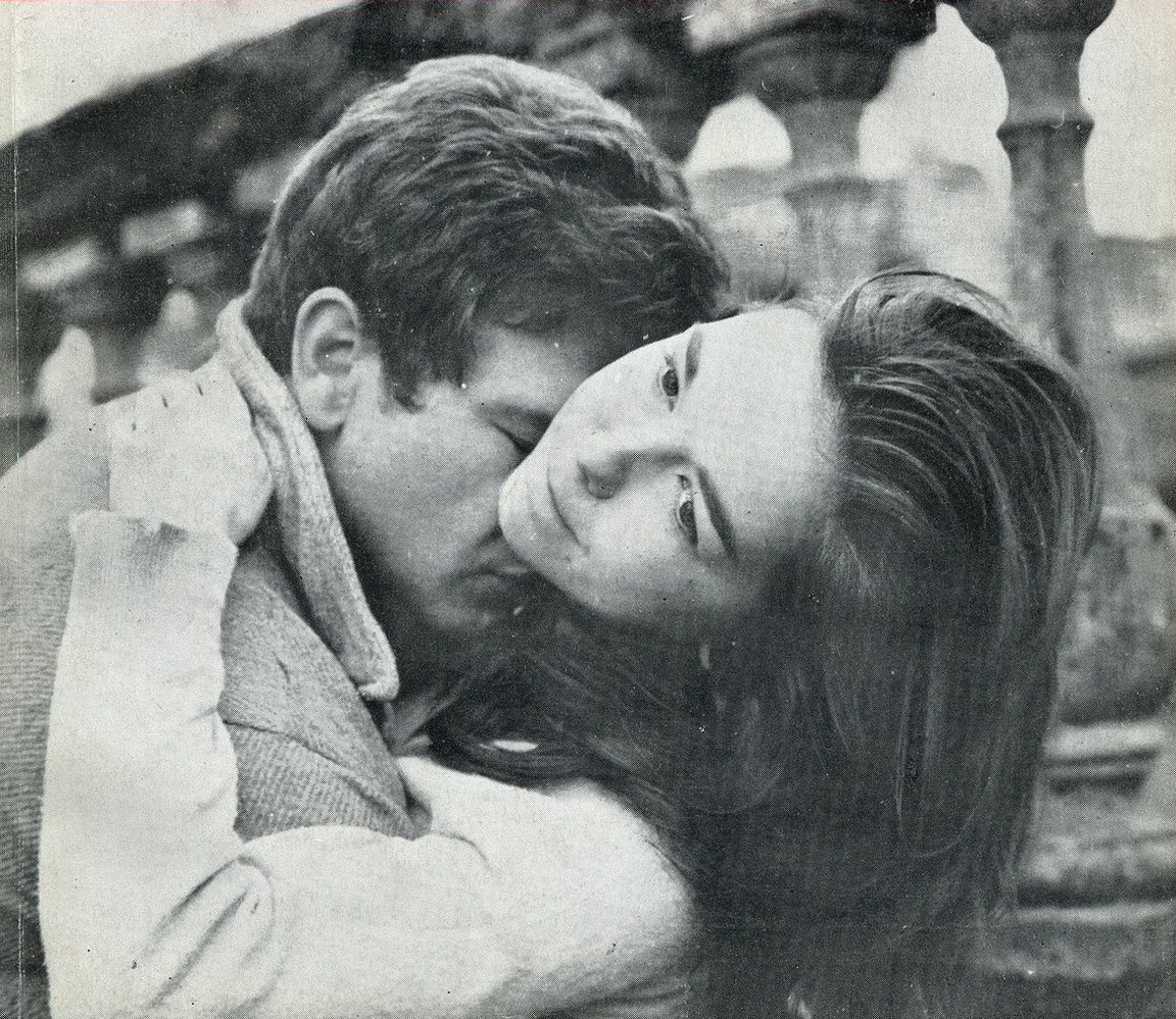 Alberto Argibay y Virginia Lago en Alias Gardelito de Licensing This image is in the public domain because the copyright of this photograph, registered in Argentina, has expired. (Both at least 25 years have passed after the photograph was created, and it was first published at least 20 years ago, Law 11.723, Article 34 as amended, and Berne Convention Article 7 (4)). Use this template exclusively for photos and NOT for drawings or other pieces of art. Warning: date and source of any publication prior to 20 year old must be indicated so anyone can check it, and clear evidence that the image was taken more than 25 years ago must be given.